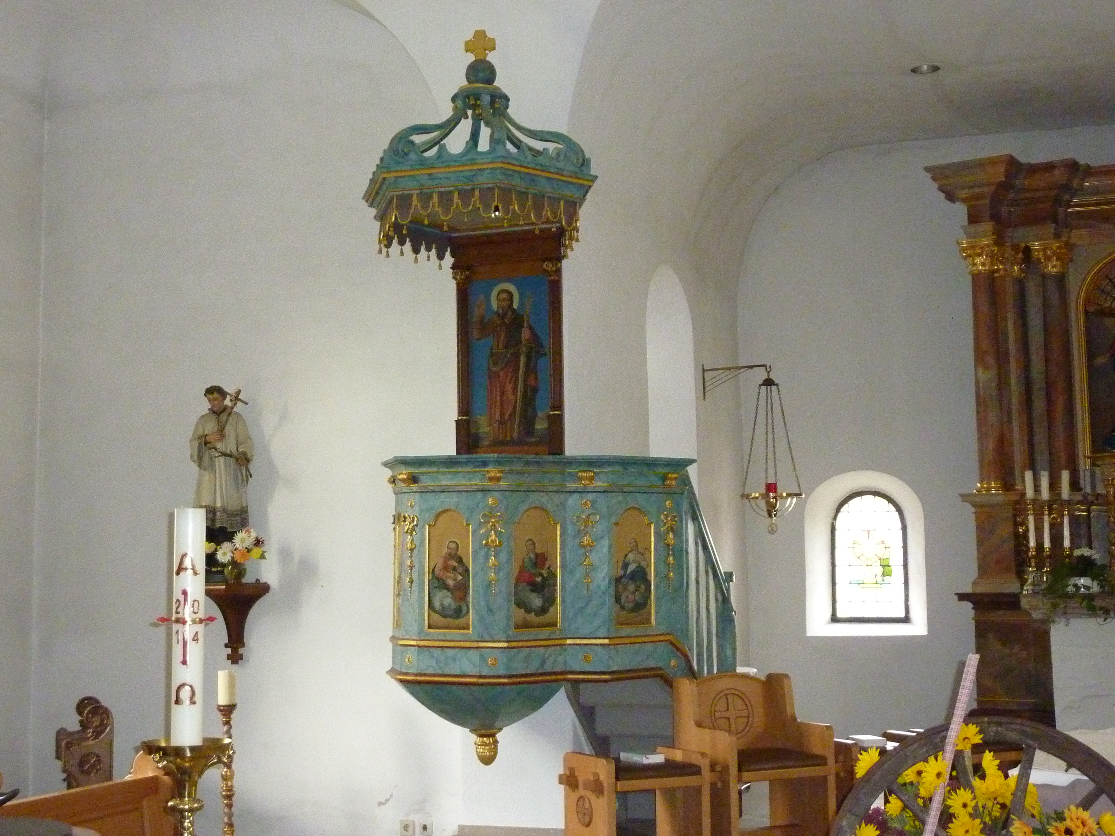 Uedelhoven, Kreuzstr. 24, kath. Pfarrkirche St. Maria Himmelfahrt 4, Kanzel